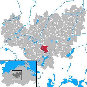 Hoppenrade in Mecklenburg-Vorpommern - District Güstrow